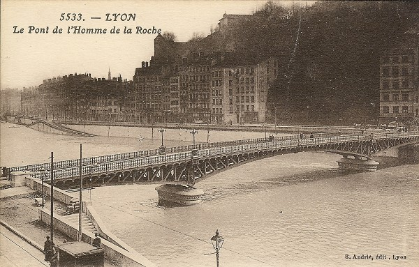 Carte postale ancienne présentant le pont de l'Homme de la Roche, sur la Saône, à Lyon.